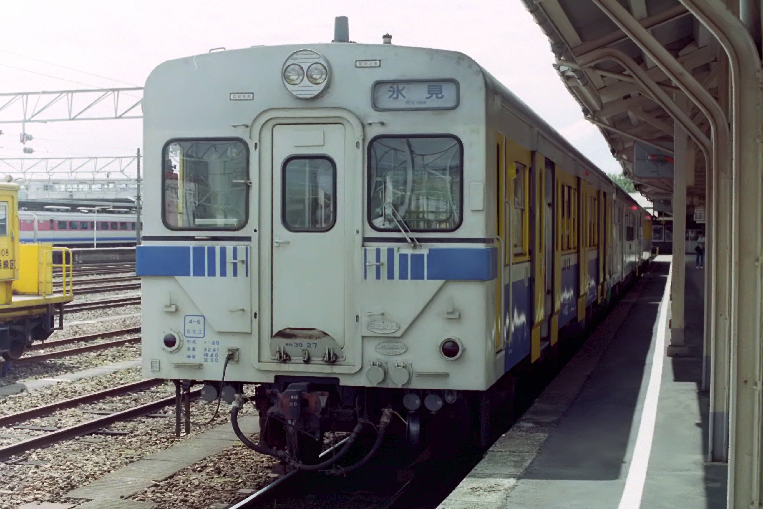 キハ30 27 高岡駅